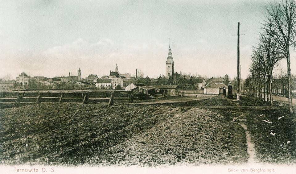 Widok miasta Tarnowskie Góry z Kolonii "Wolność Górnicza" ok. 1900 roku